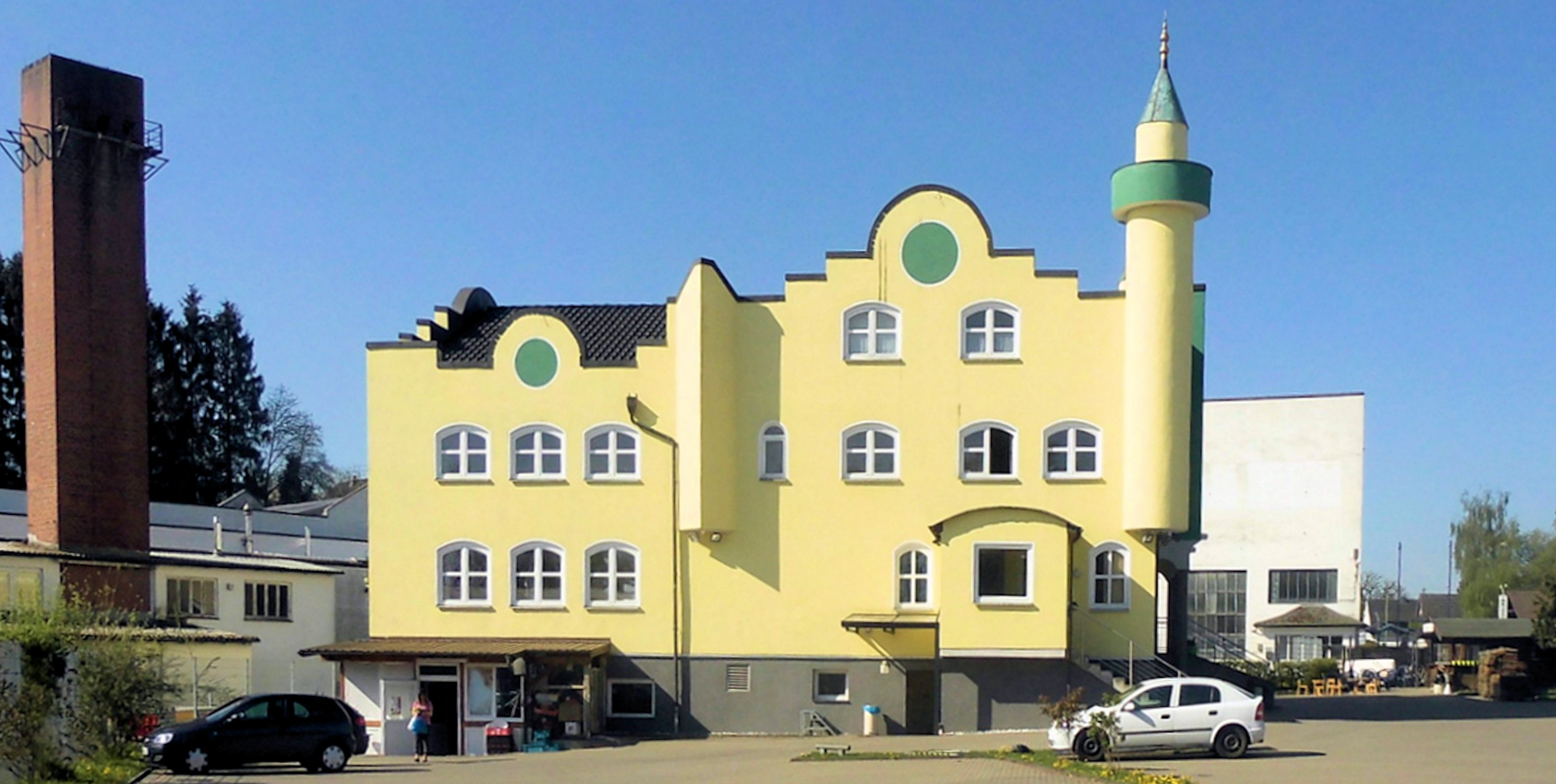 Yeşil Cami (Grüne Moschee) in Waldbröl, Deutschland